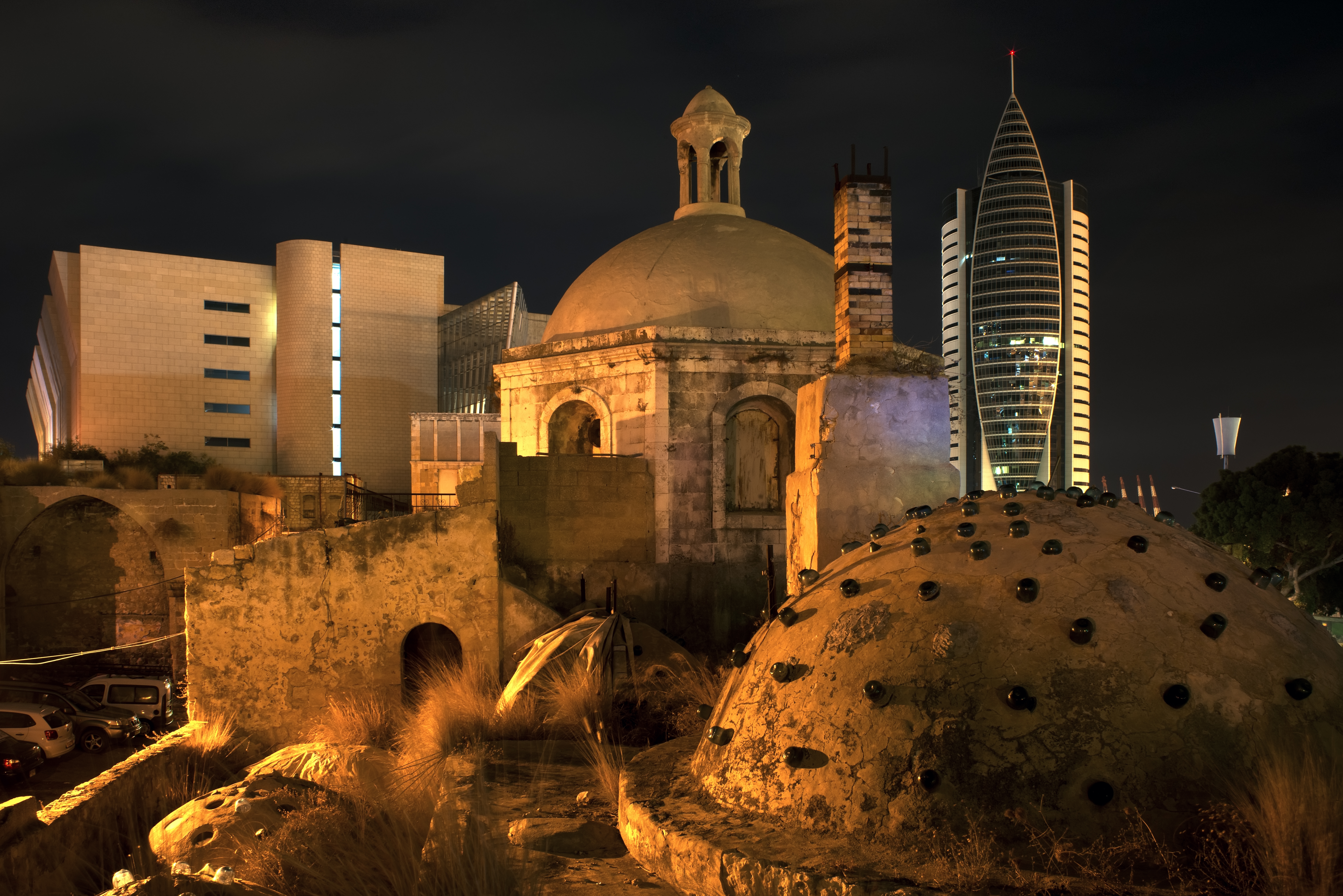 מתחם אל-פאשה בחיפה